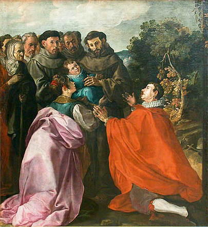 La curación de San Buenaventura niño por San Francisco. 234 x 218 cm.